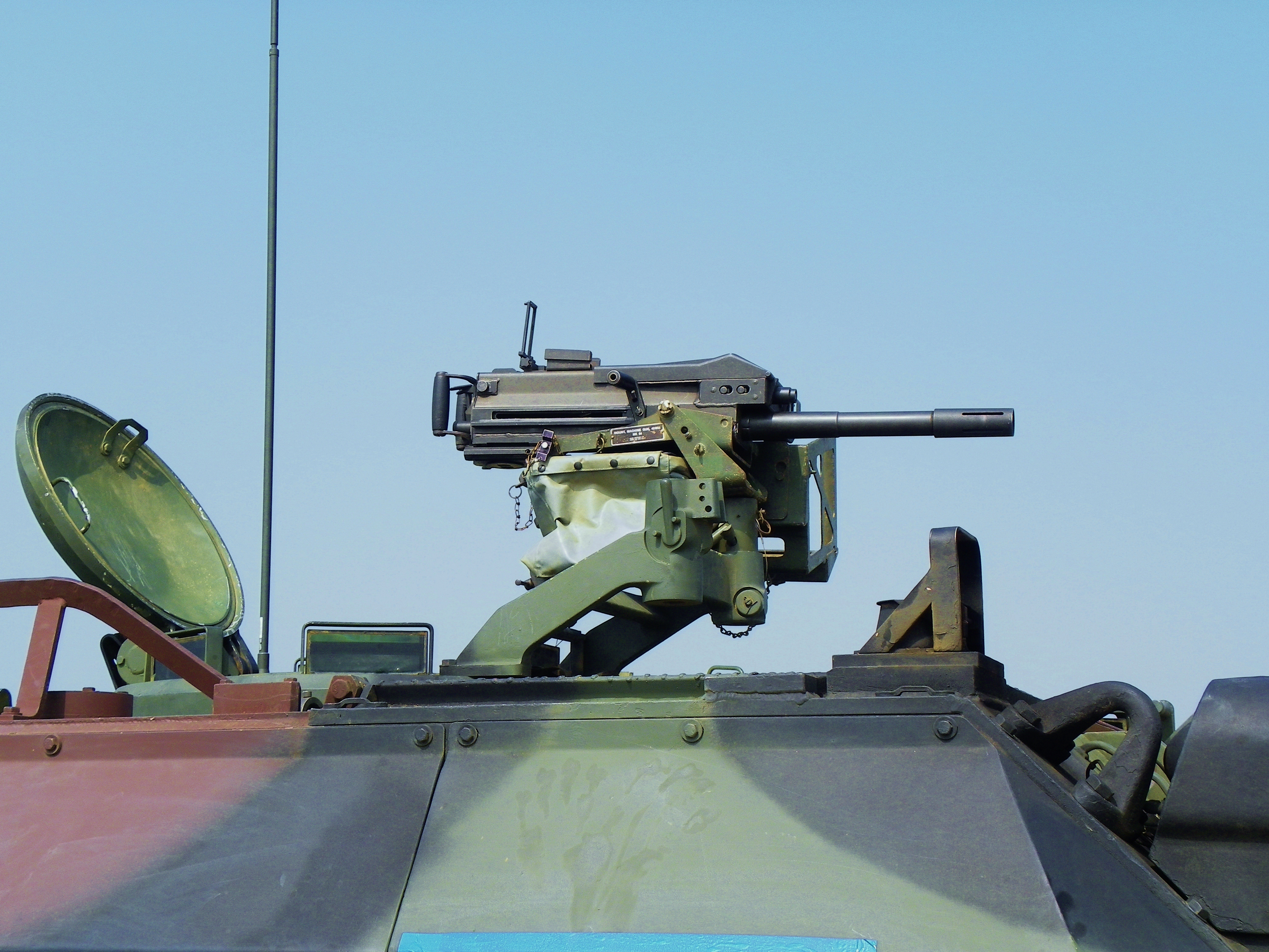 搭載於CM-21A裝甲運兵車的Mk 19 40公釐榴彈發射器。